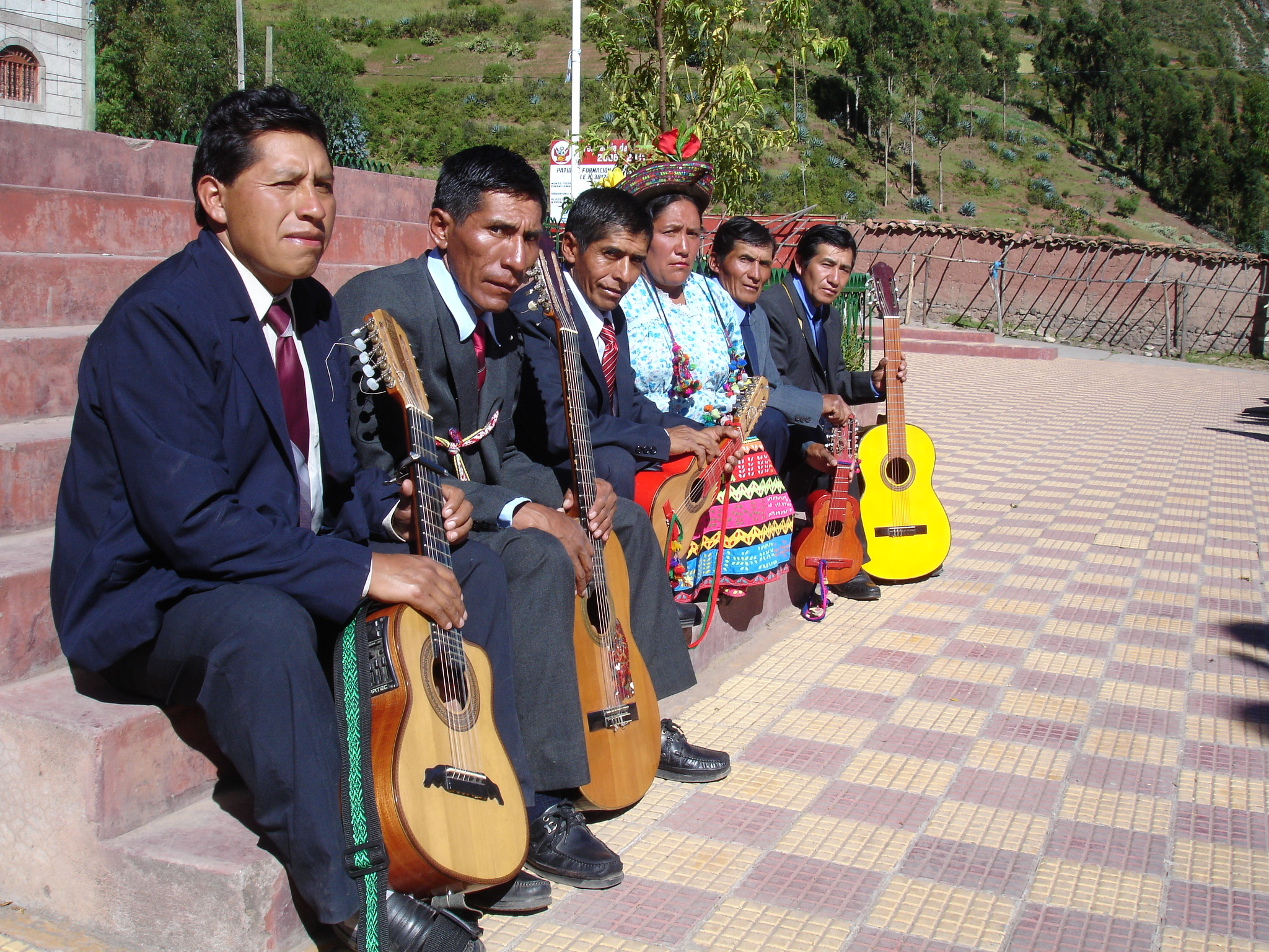 Chikitukus de chuschi, agrupación de música autoctona de la Villa de Chuschi, Ayacucho, Perú